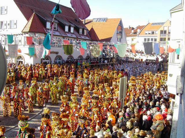 Fasnetssonndig (Fastnachtssonntag) in Schömberg